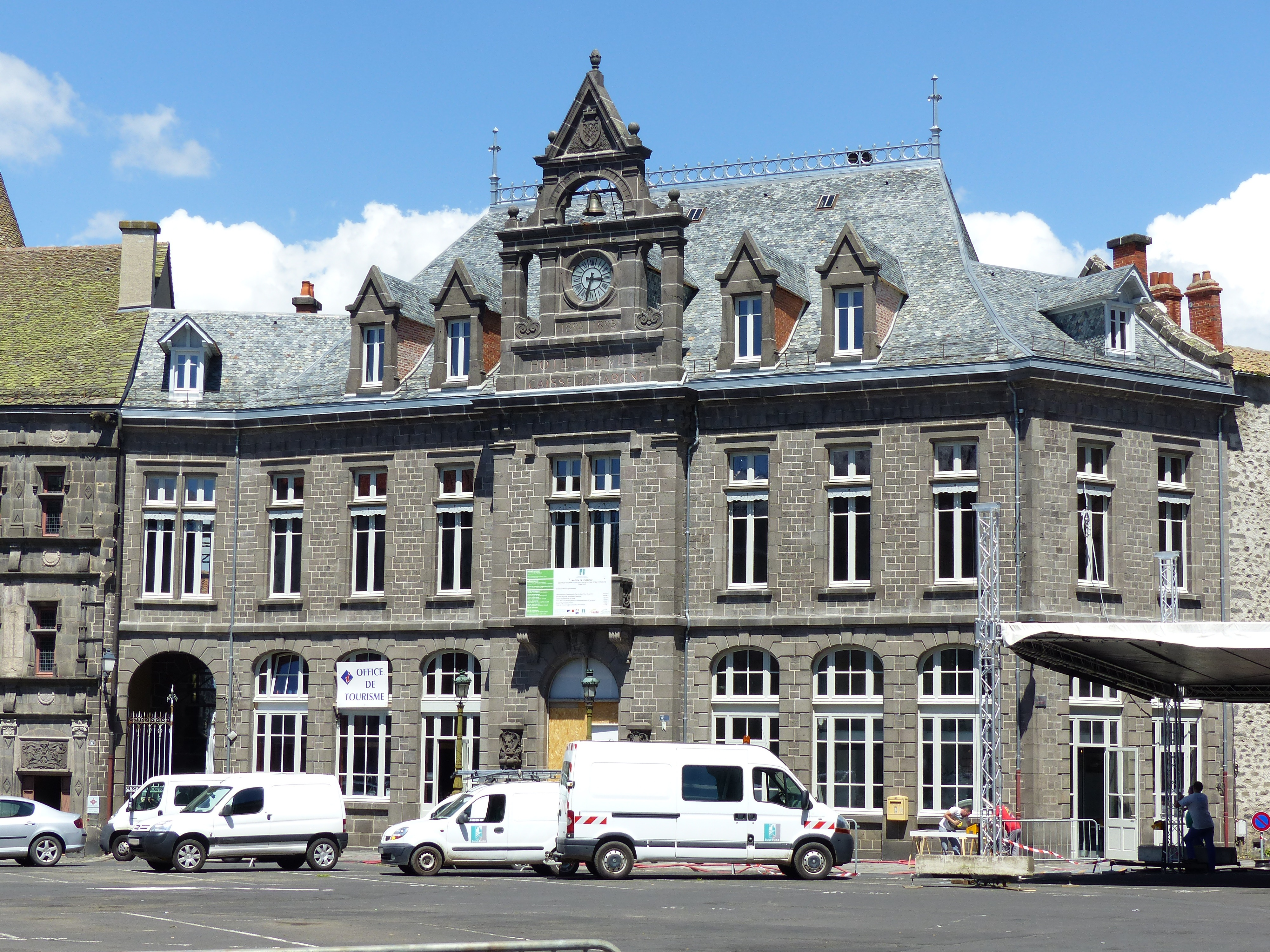 Hôtel de Ville .